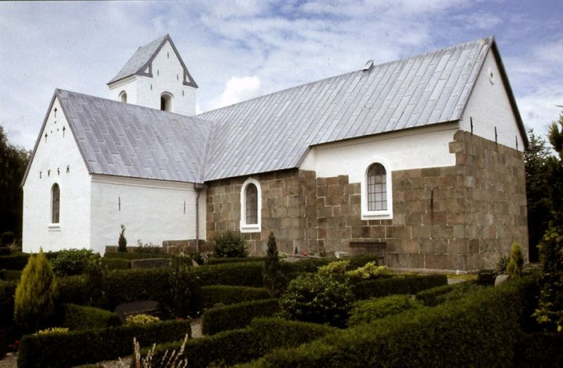 Horsens Kirke i Danmark. Horsens kirke (Kær hr.)